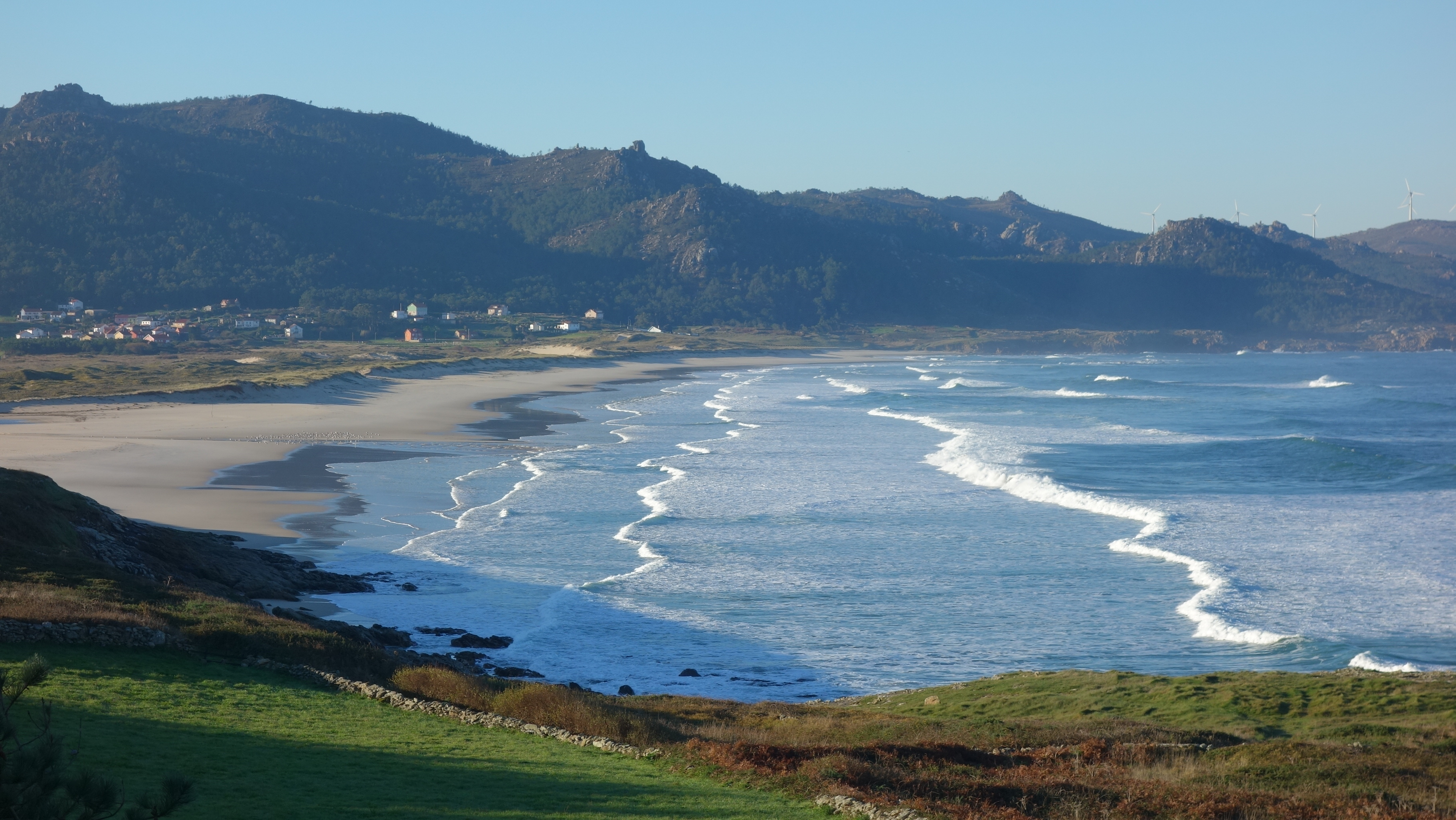 Costa da Morte - Playa de Traba (Laxe, A Coruña) This is a photography of a Special Area of Conservation in Spain with the ID: ES1110005. Natura2000 entry, EEA entry